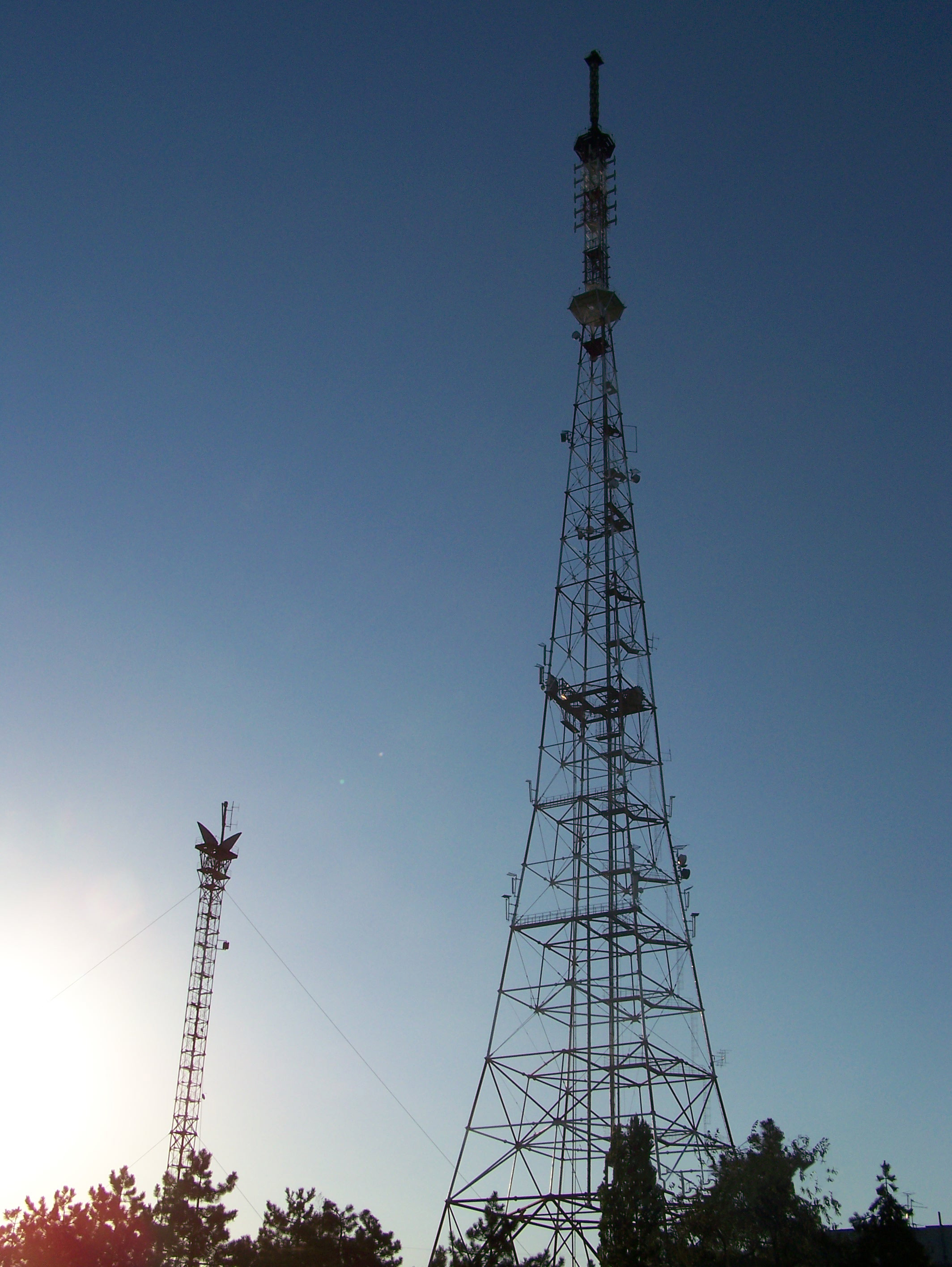 Чимишлийские радиотелевизионные башня и мачта